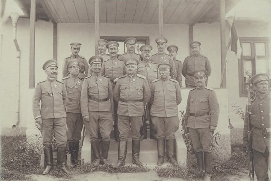 Щабът на Трета пехотна балканска дивизия.